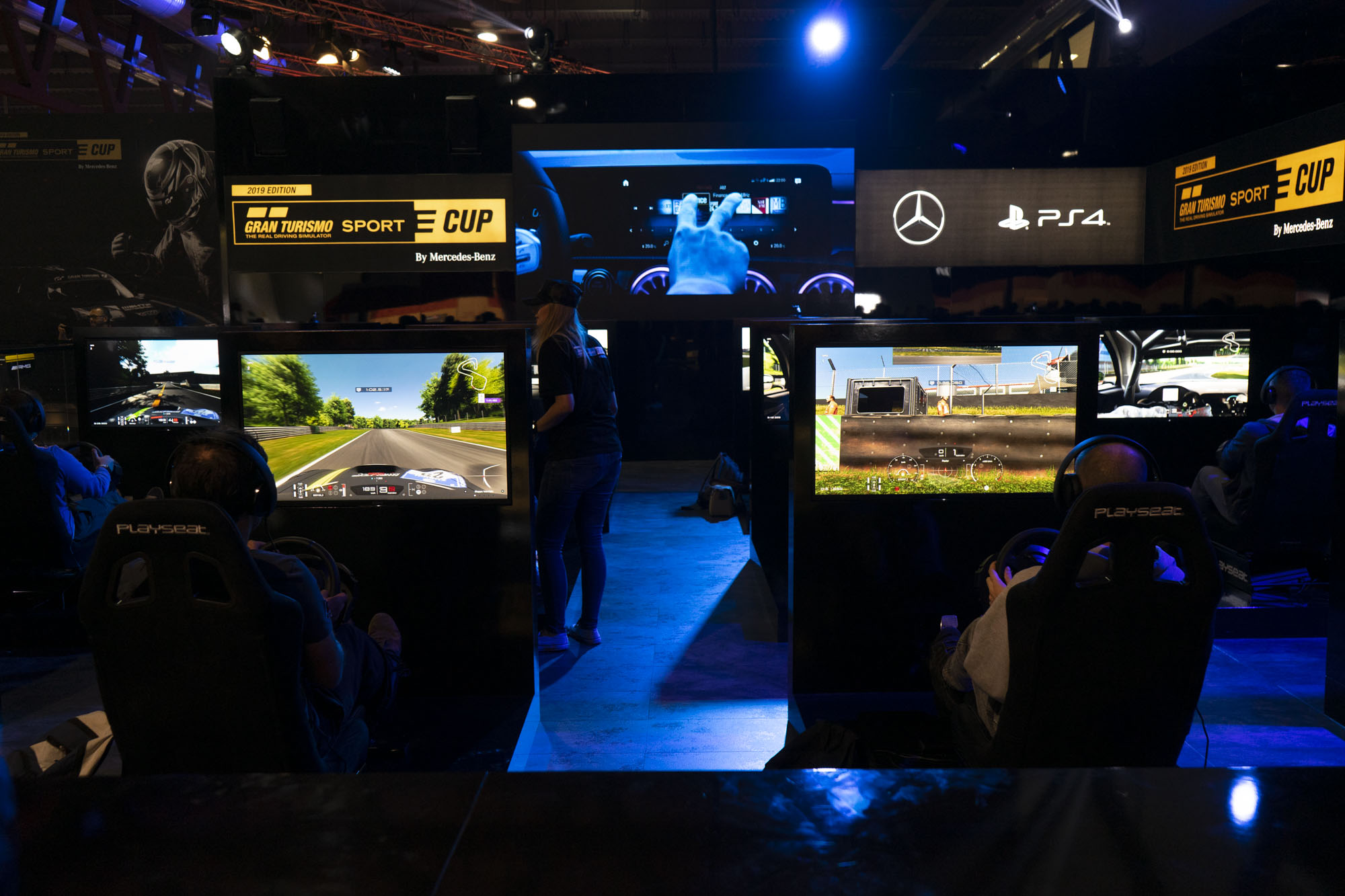 Postazioni di gioco presenti alla Games Week di Milano.